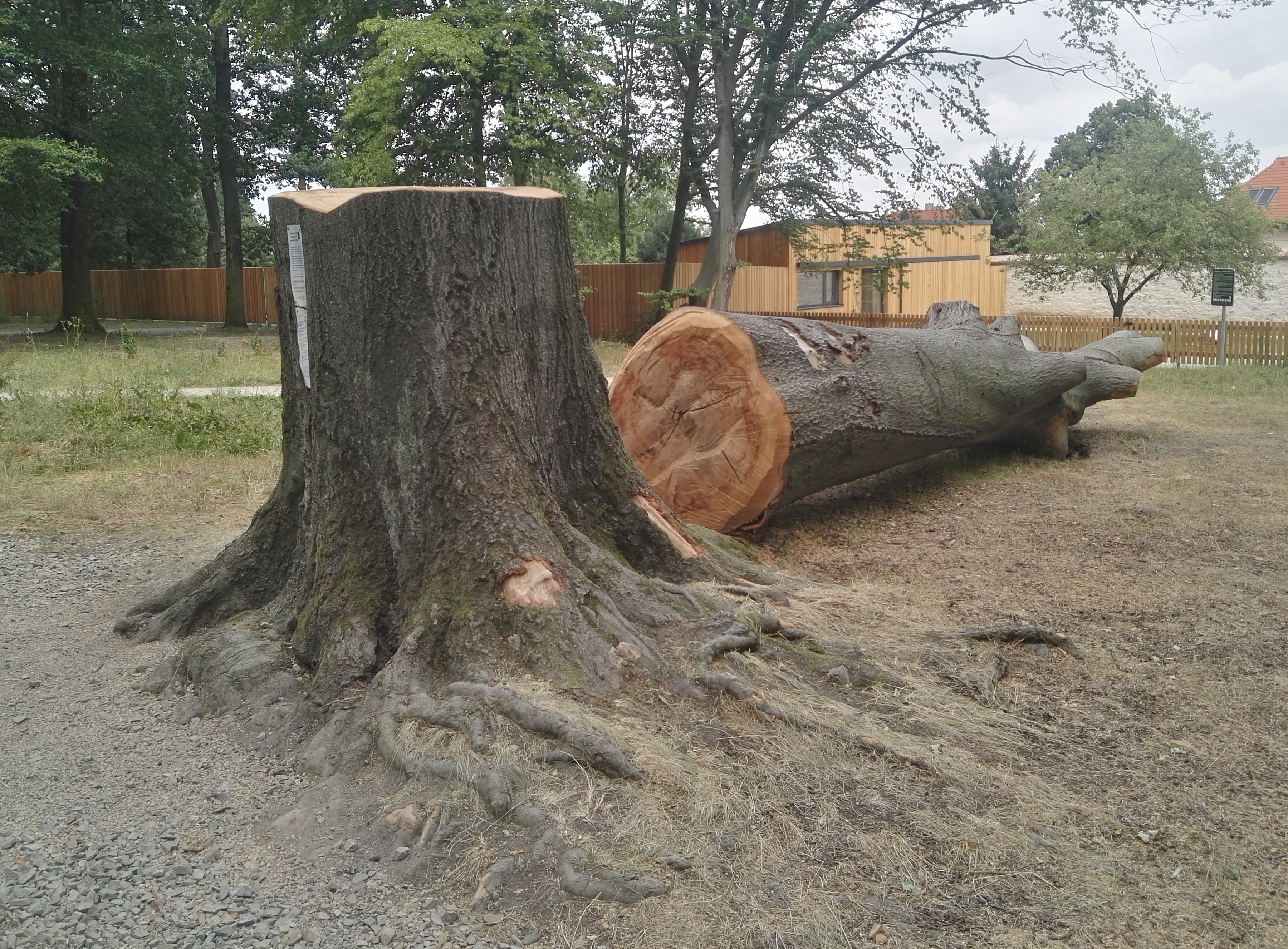 Obora Hvězda, památný buk u Libocké brány poražený v roce 2019